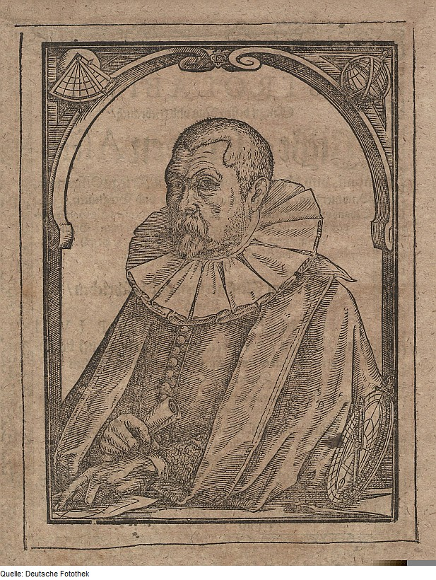 Original image description from the Deutsche FotothekAstronomie & Porträt